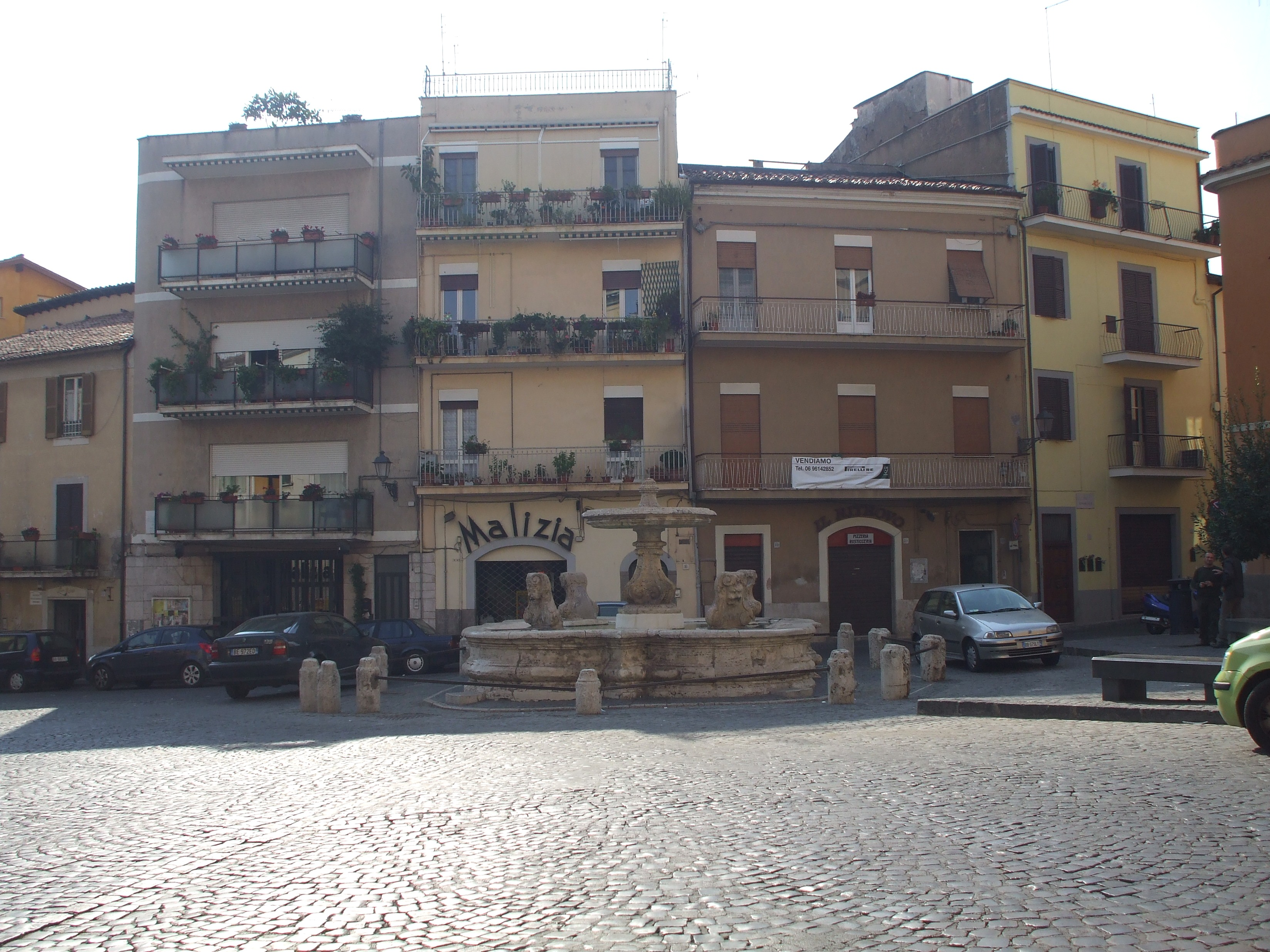 Velletri - fontana di piazza Mazzini